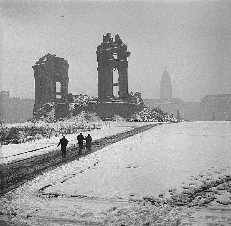 Original image description from the Deutsche Fotothek Ruine der Frauenkirche gegen Rathausturm